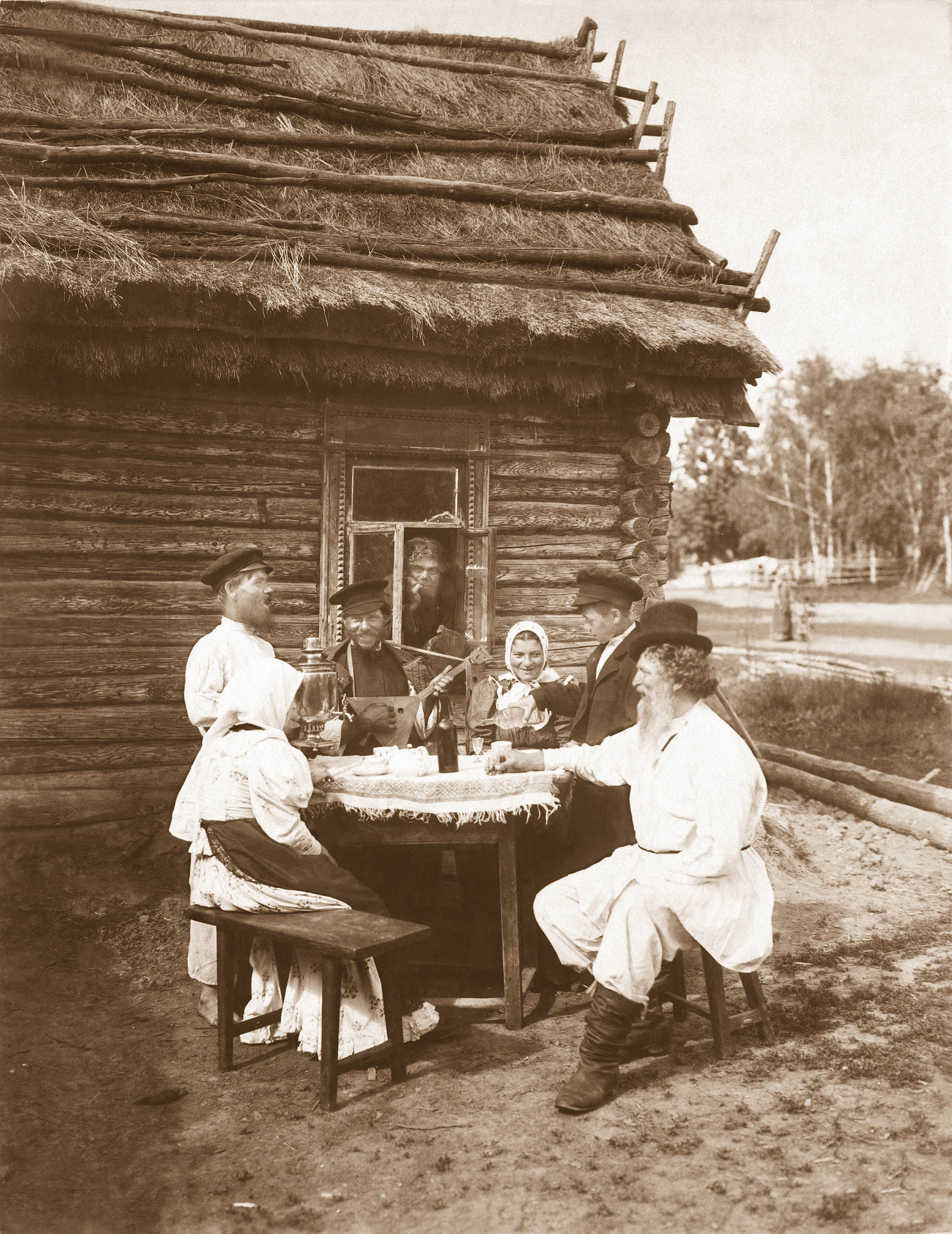 Группа крестьян за столом. Ок.1907–1915 гг. Фотография С.М. Прокудина-Горского.